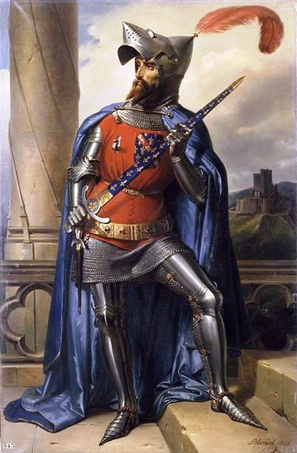 Jacques de Bourbon, comte de La Marche, Connétable de France en 1354 devant la forteresse de Château-Gaillard. Copie d'après un original jadis au château d'Eu ; commandé par Louis-Philippe pour le musée historique de Versailles en 1834.